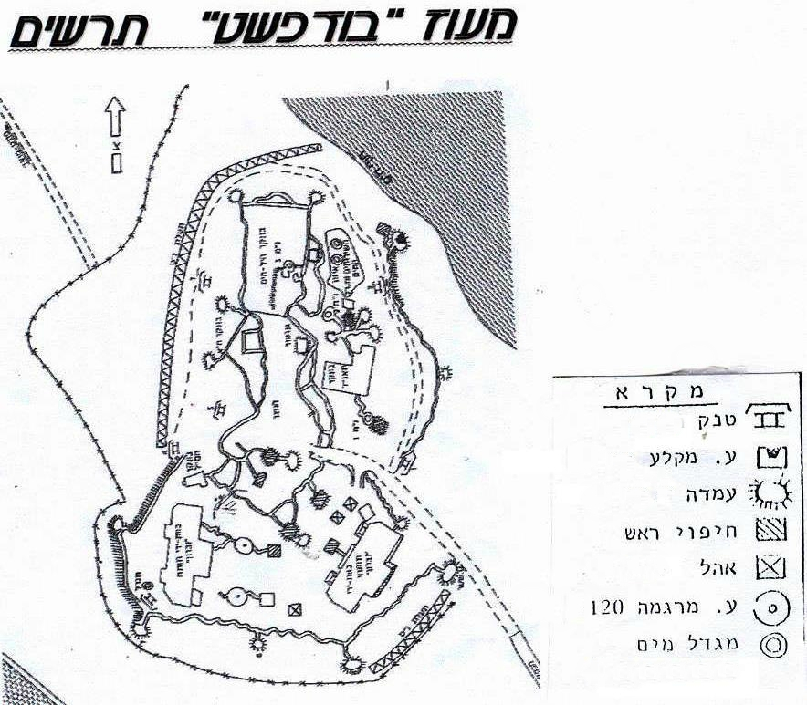 תרשים של מעוז בודפשט.